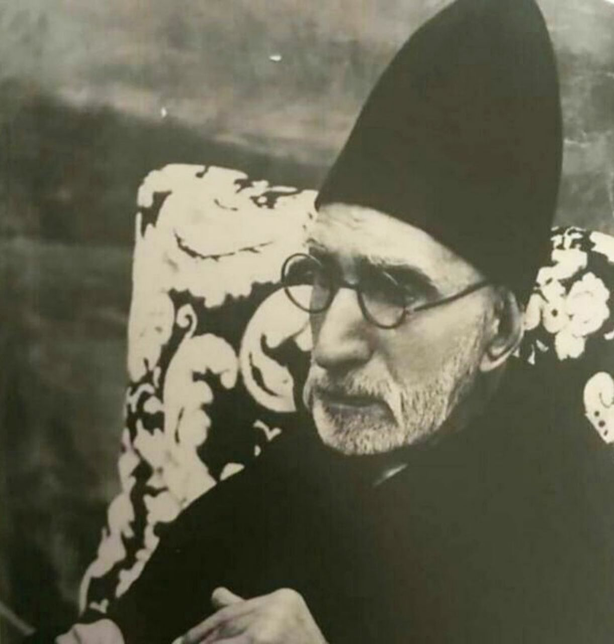 میرزا محمد علی حب حیدراردبیلی (ابوالفتوح) قطب 38 سلسله ذهبیه